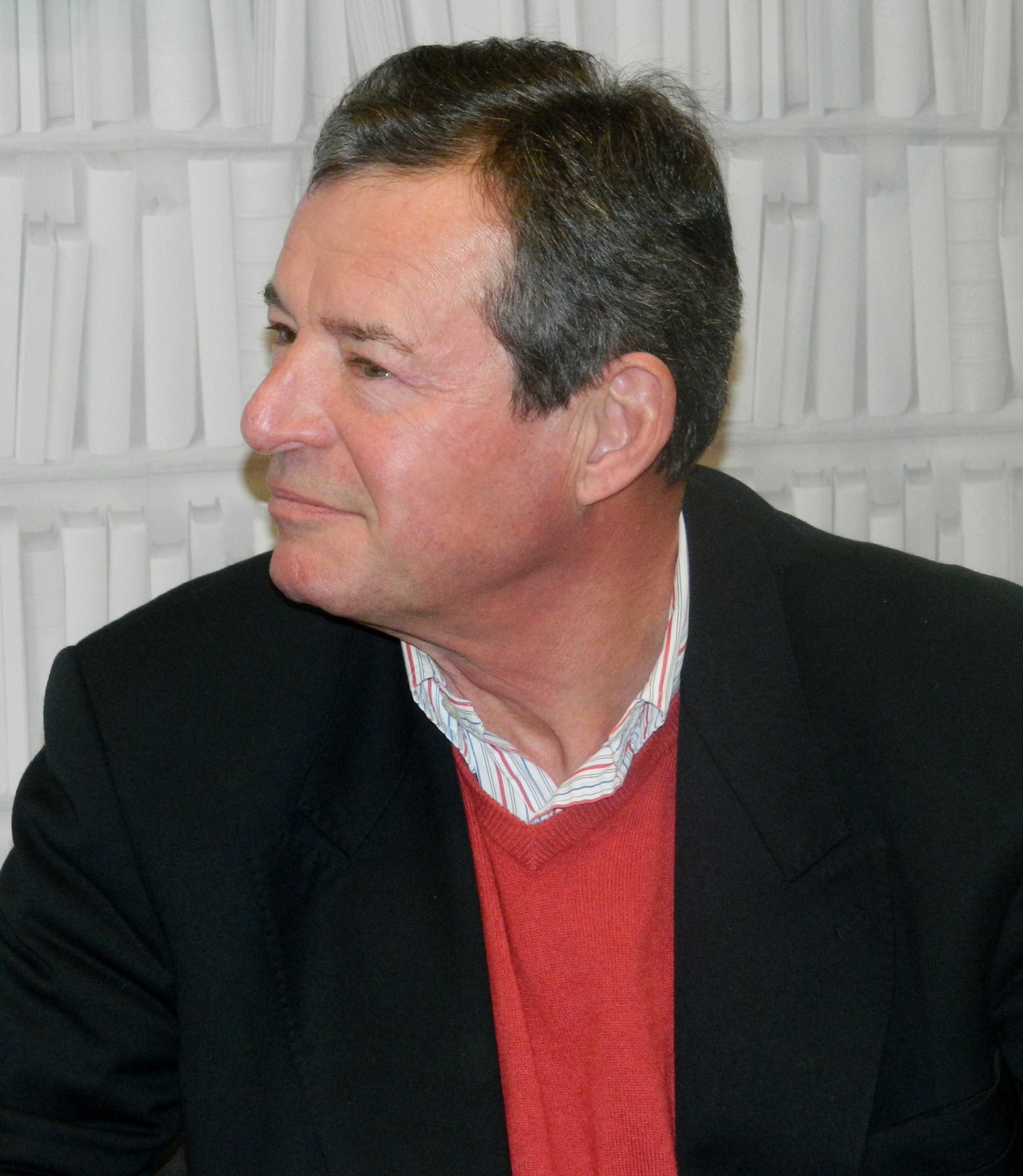 Matts Dumell Helsingin kirjamessuilla 2017